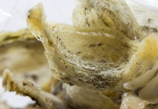 Готові до споживання ластівчині гнізда